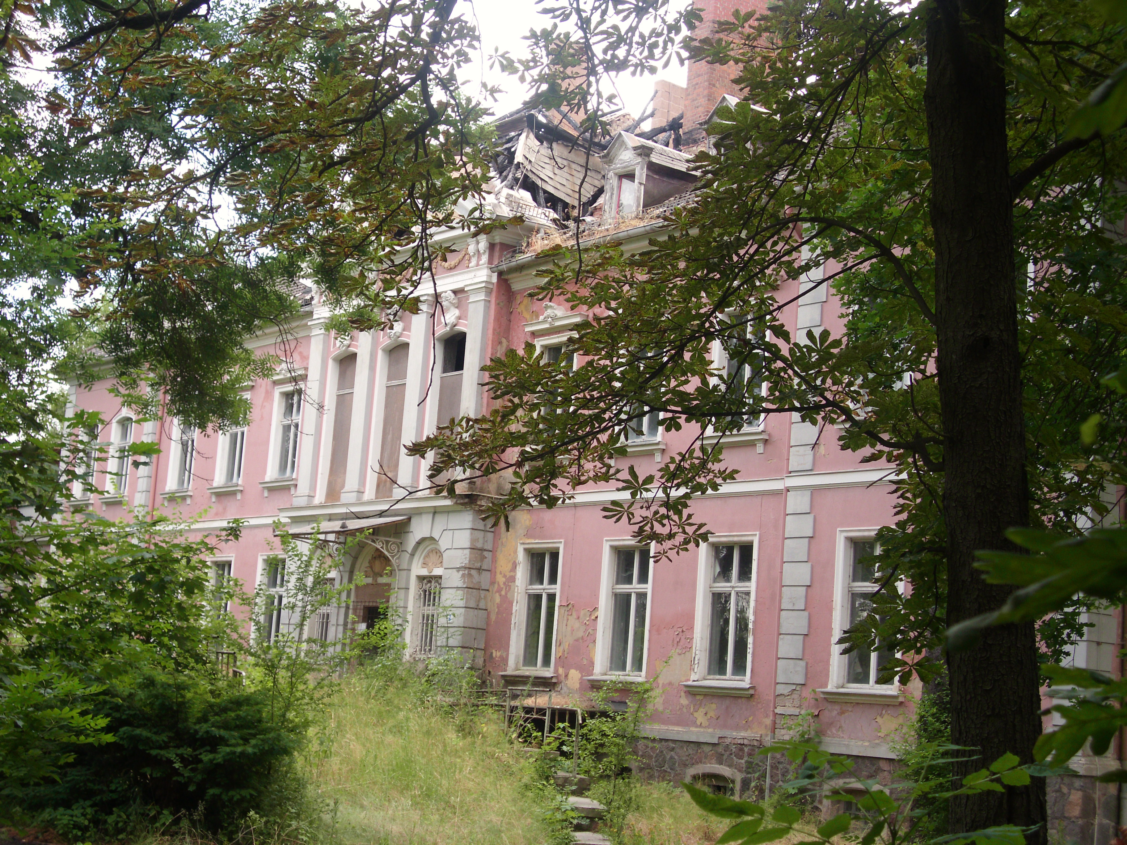 ehemaliges Gutshaus, Rosengarten bei Frankfurt (Oder)